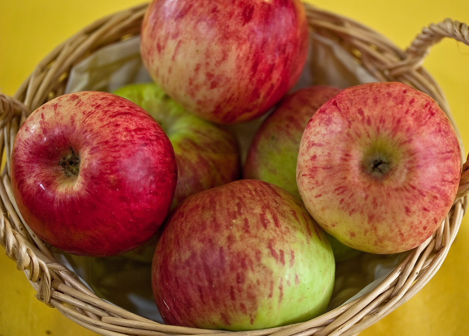 Der Heuchelheimer Schneeapfel ist eine Apfelsorte